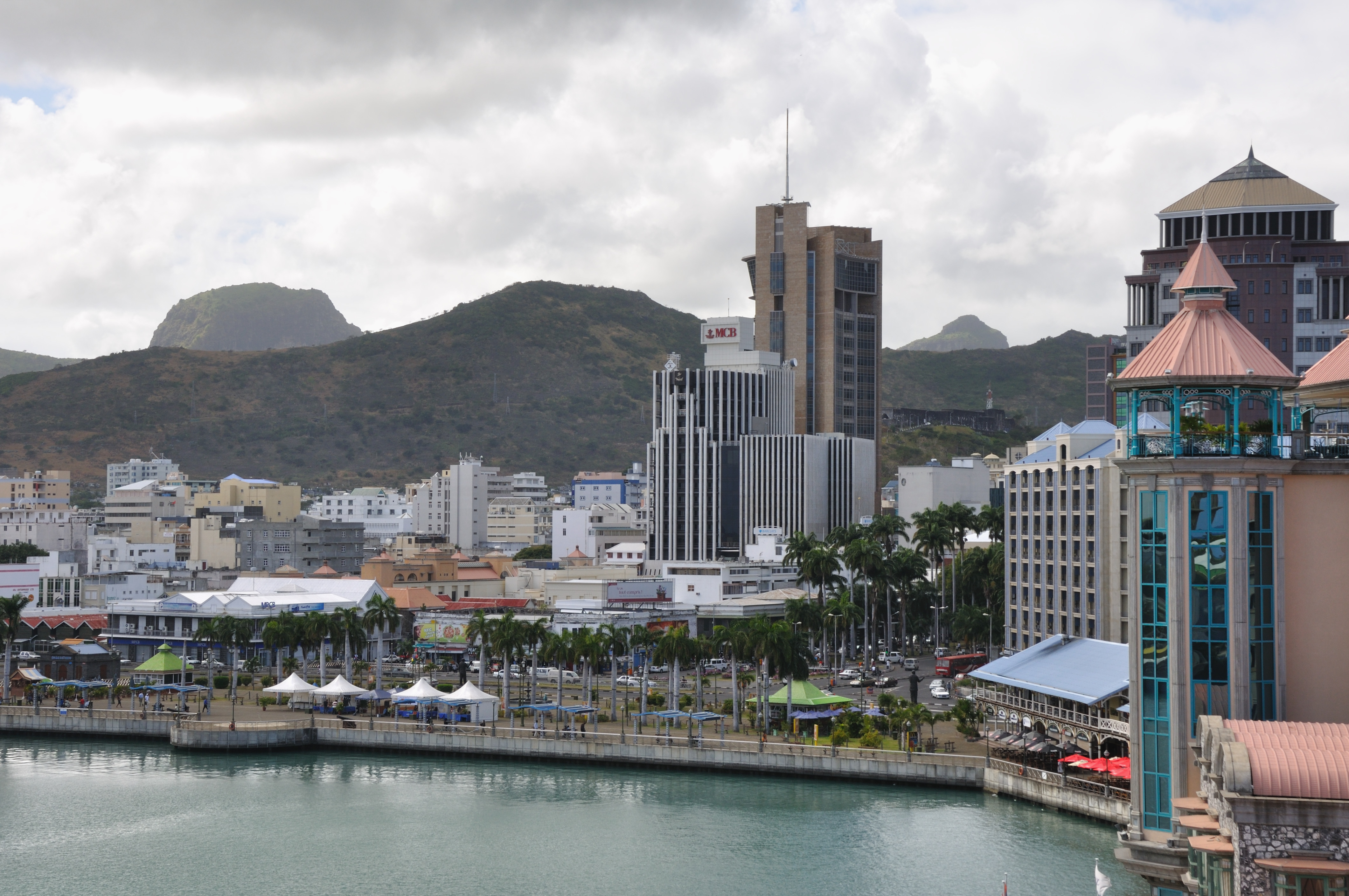 Mauritius, Port Louis